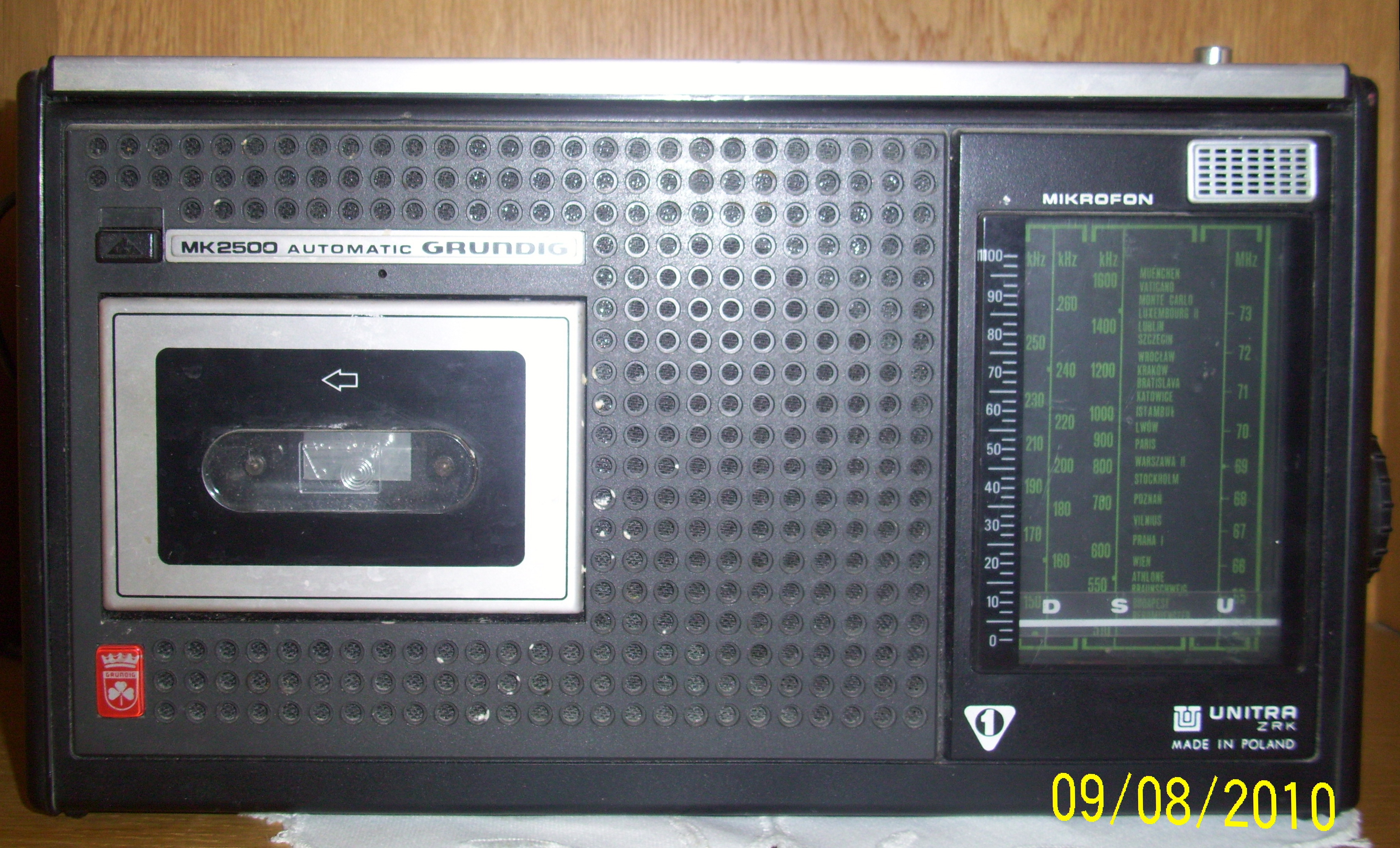 Radiomagnetofon MK2500 Zakładów Radiowych im. Marcina Kasprzaka w Warszawie produkowany na licencji firmy Grundig.